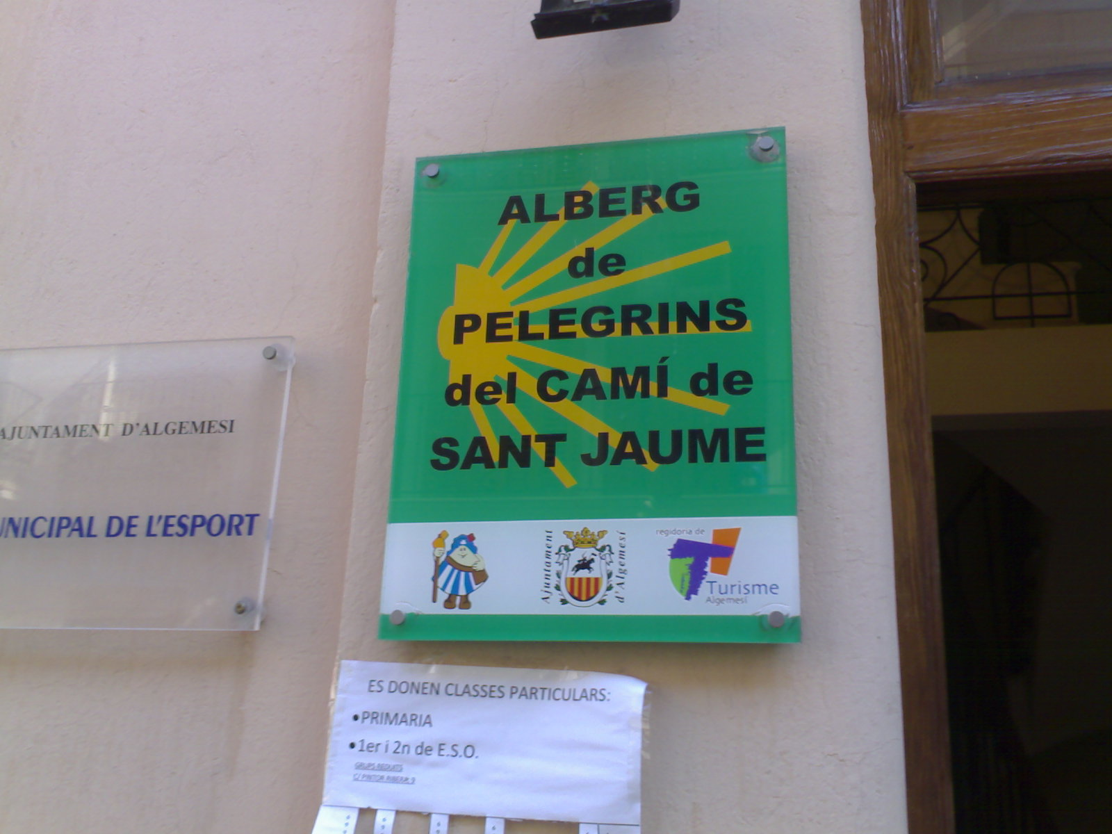 Albeg d'agemesí